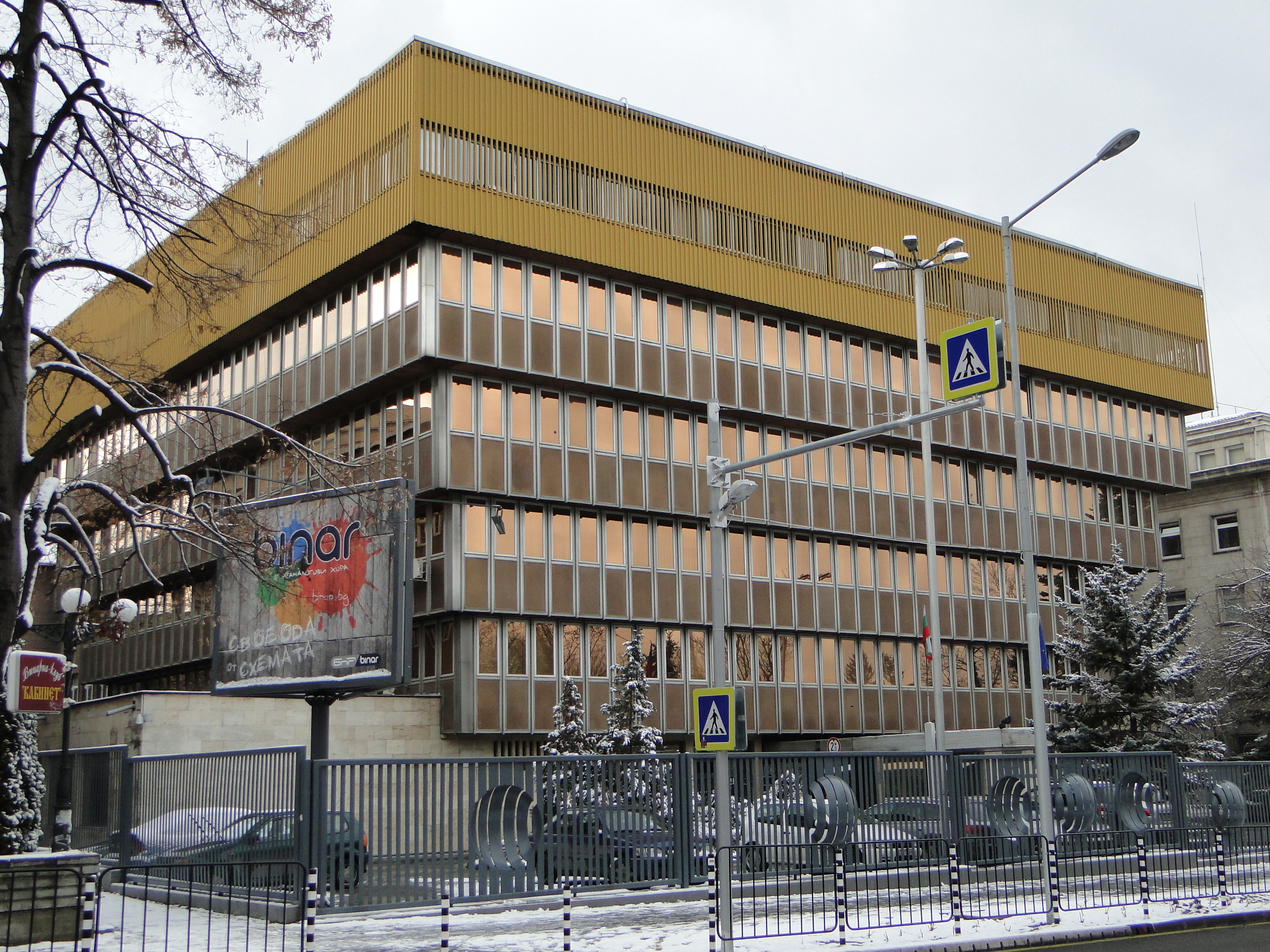 София, 19.01.2013 - Sofia